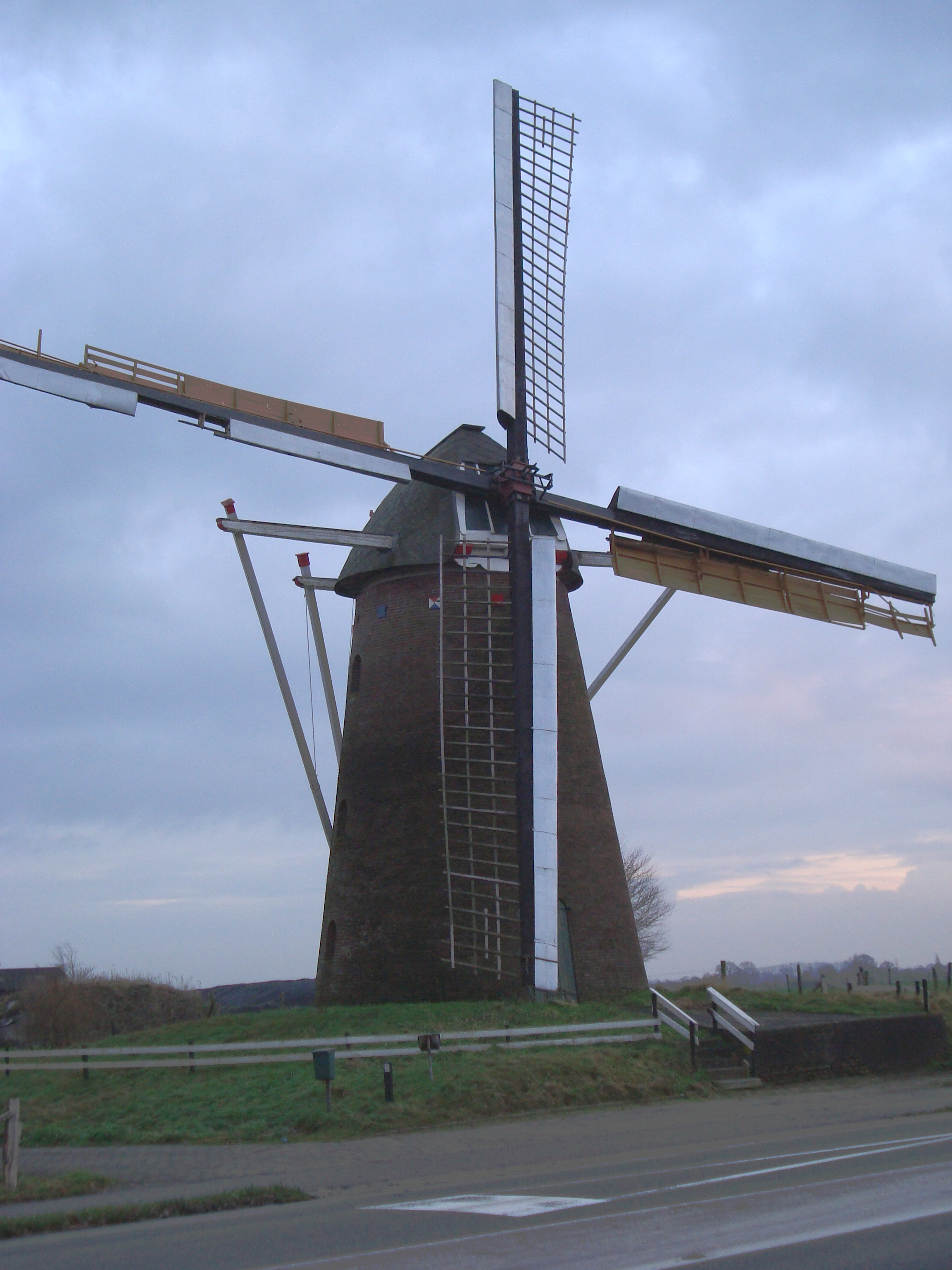 Molen "Braamse Molen in Braamt, Nederland